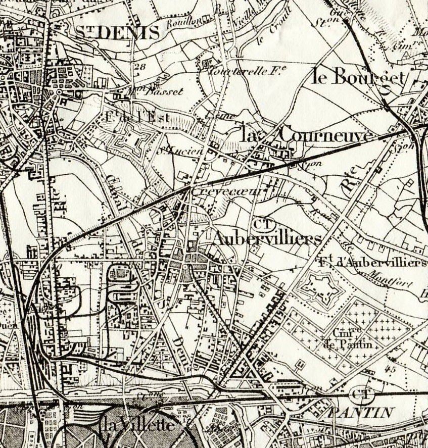 Extrait de la Carte d'état-Major de 1888 (Paris SE) au 1/80000 scannée à 300 dpi